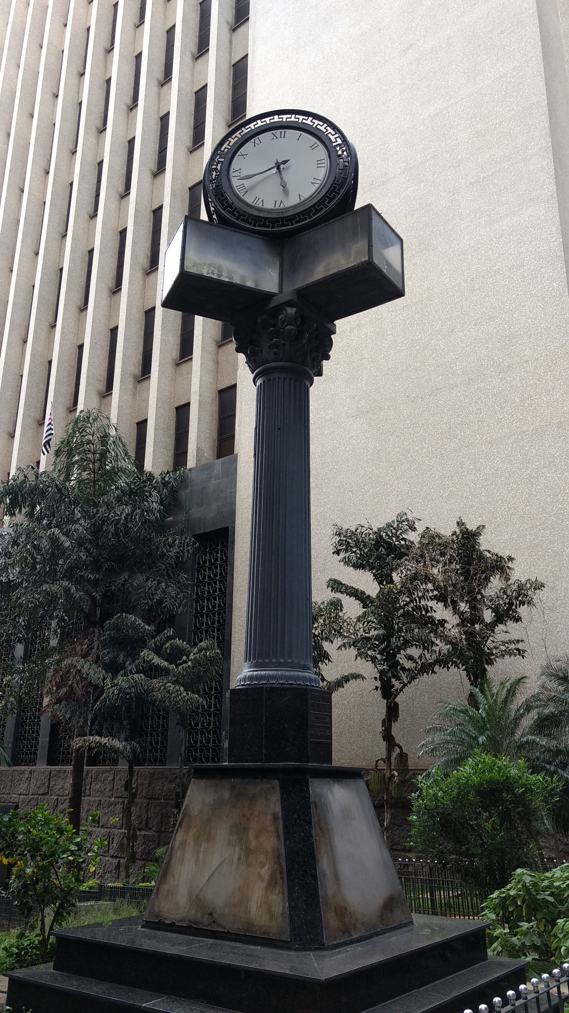 Relógio Público de Nichile localizado na Praça Antônio Prado. Também havia um desses relógios no largo do Arouche e outro na praça da Sé. No total eram seis e restou apenas esse.